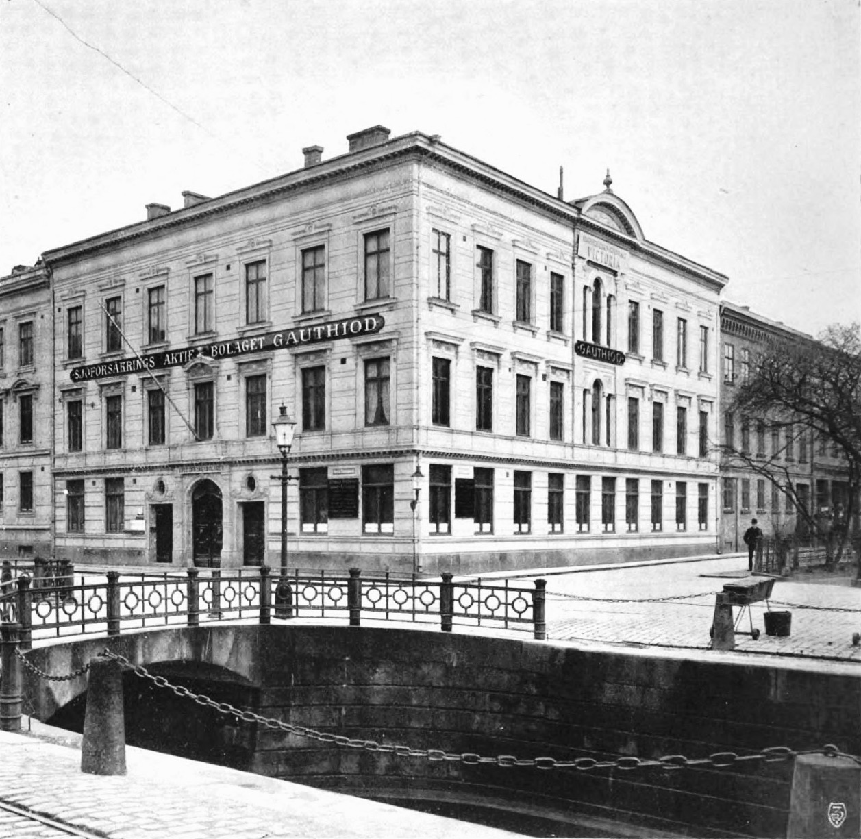 Västra Kyrkogatubron vid korsningen Västra Hamngatan 10 och Kyrkogatan i Göteborg. (Samtida bildtext: "Gauthiods Hufvudkontor, Västra Hamngatan 10, Göteborg, / Inteckningsgarantibolagets hus").